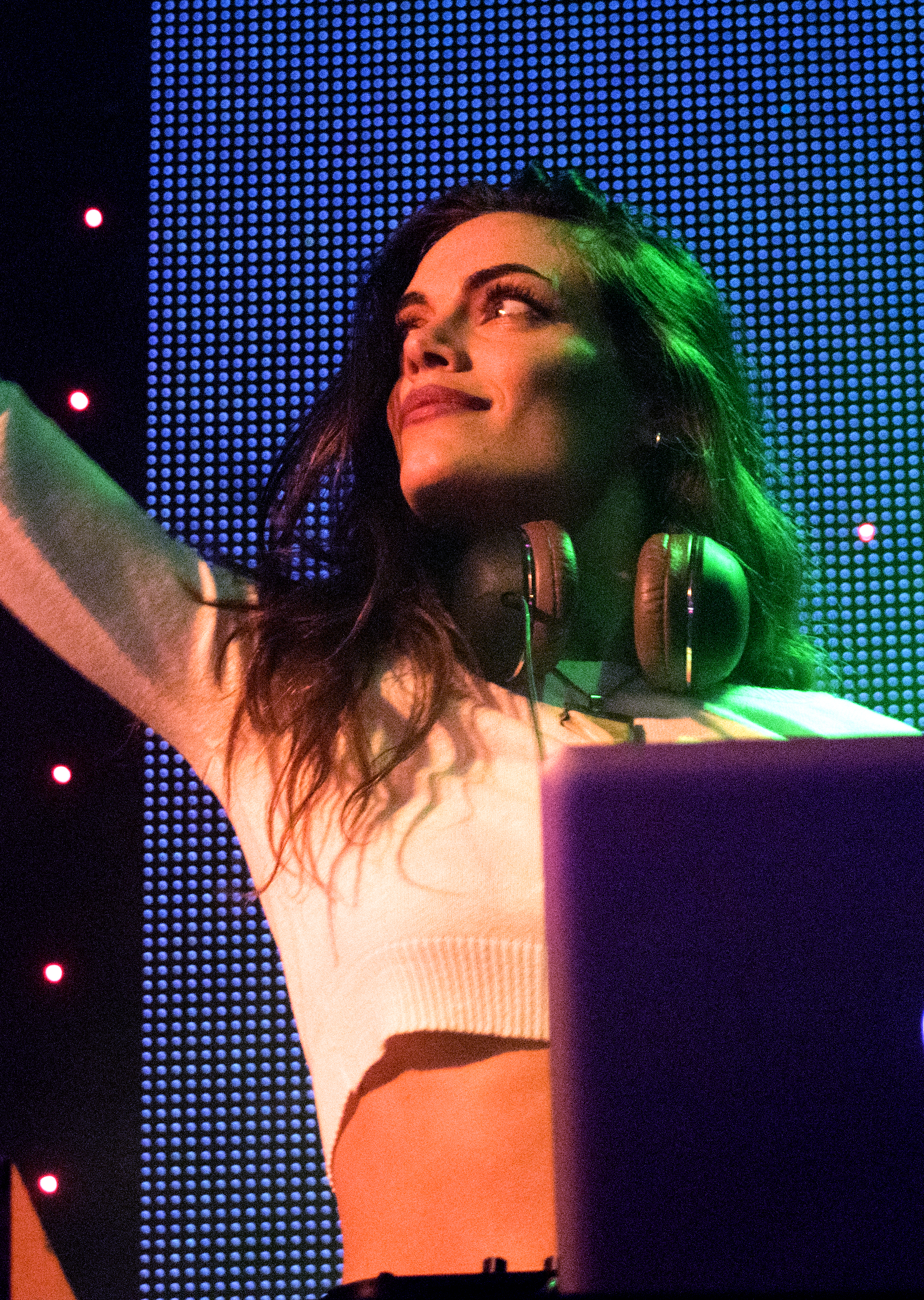 Emilia Attias en la red is red de Montevideo